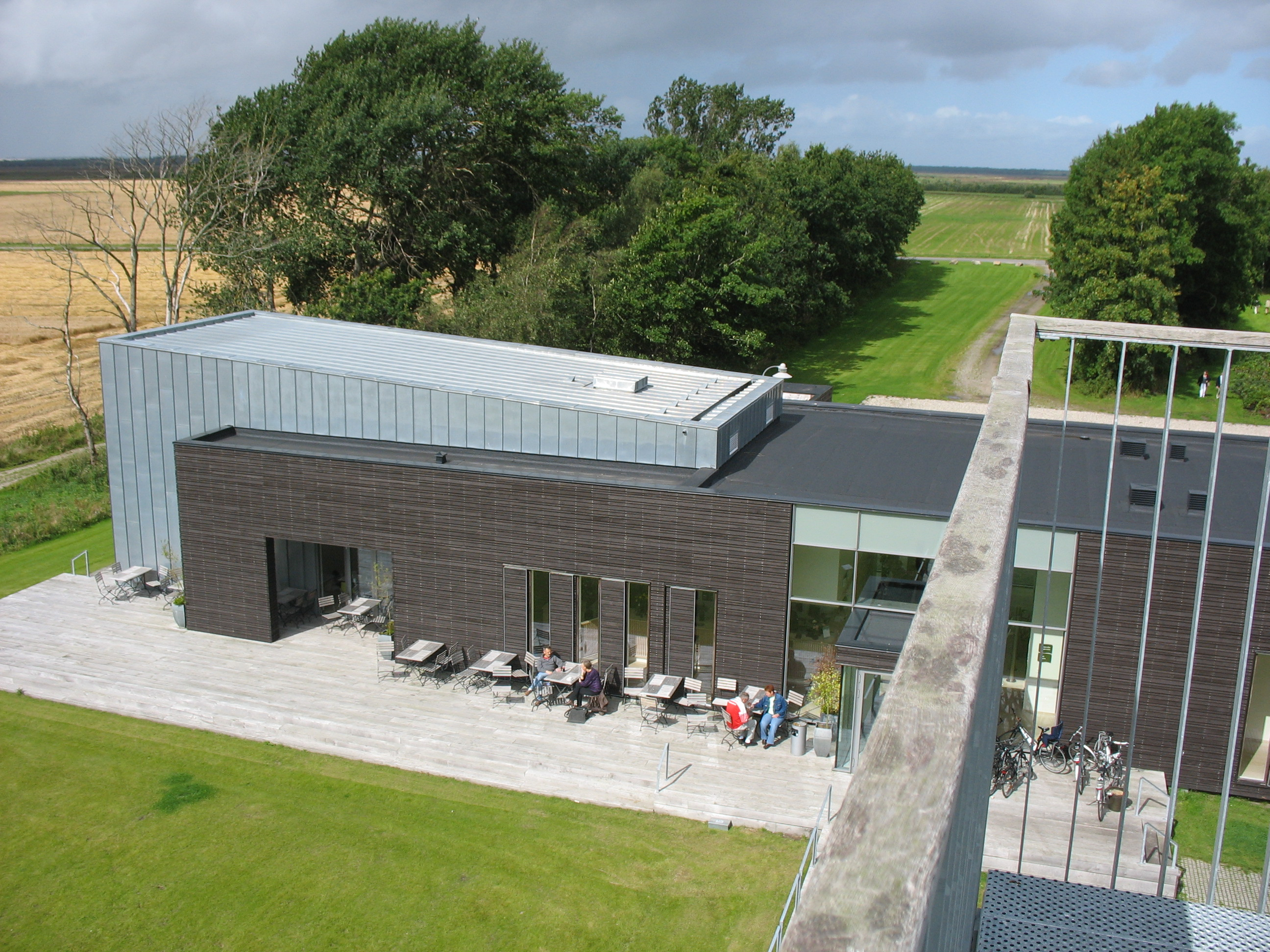 Lille Vildmosecentret.